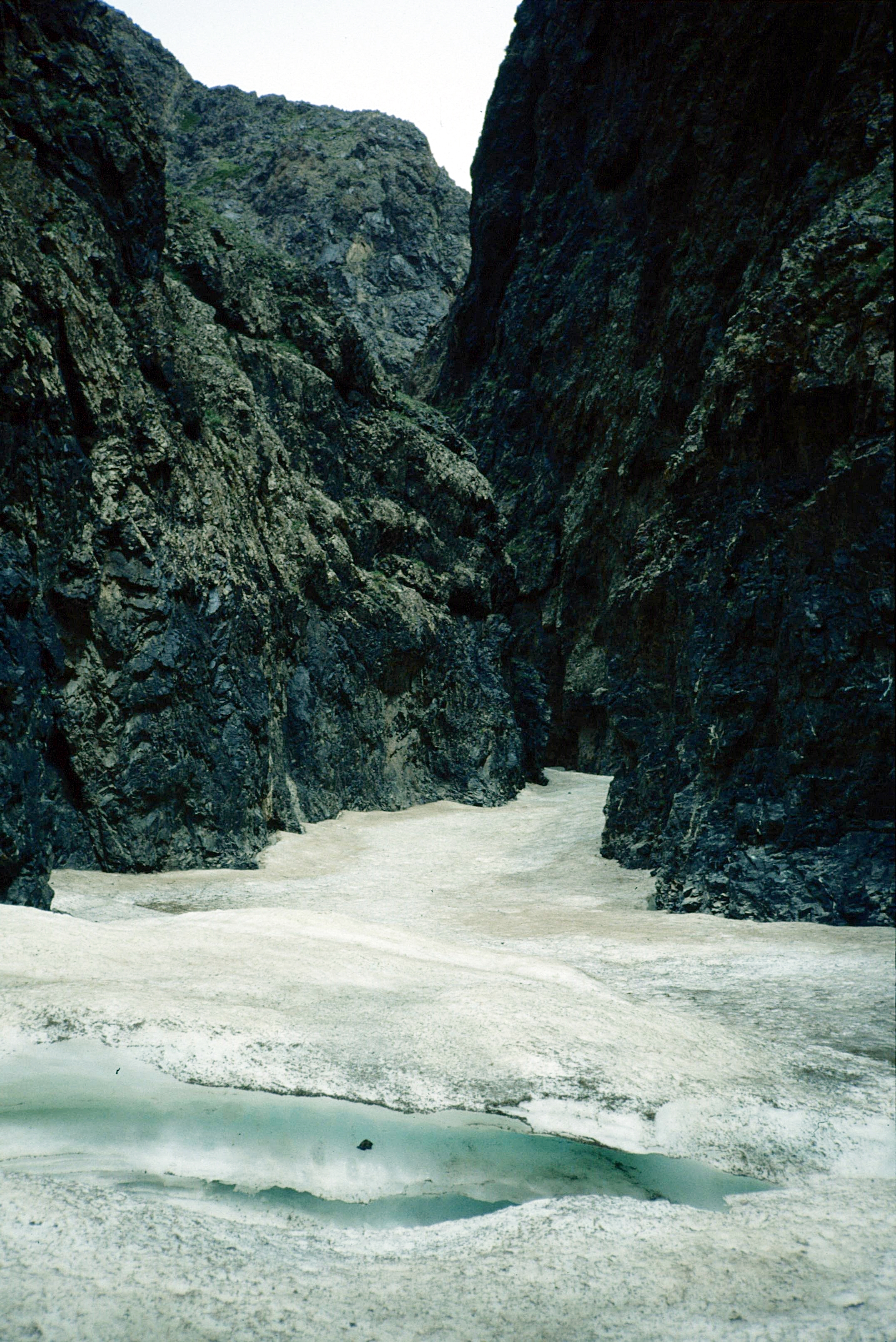 Eispanzer an der engsten Stelle der Geierschlucht im Gobi-Altai-Gebirge